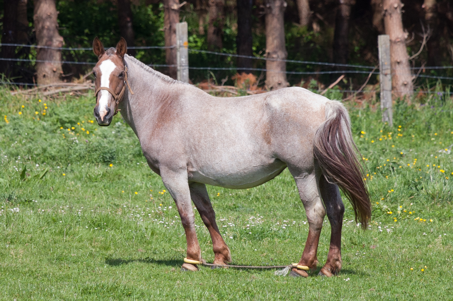 Cabalo en Vilarromarís, Oroso